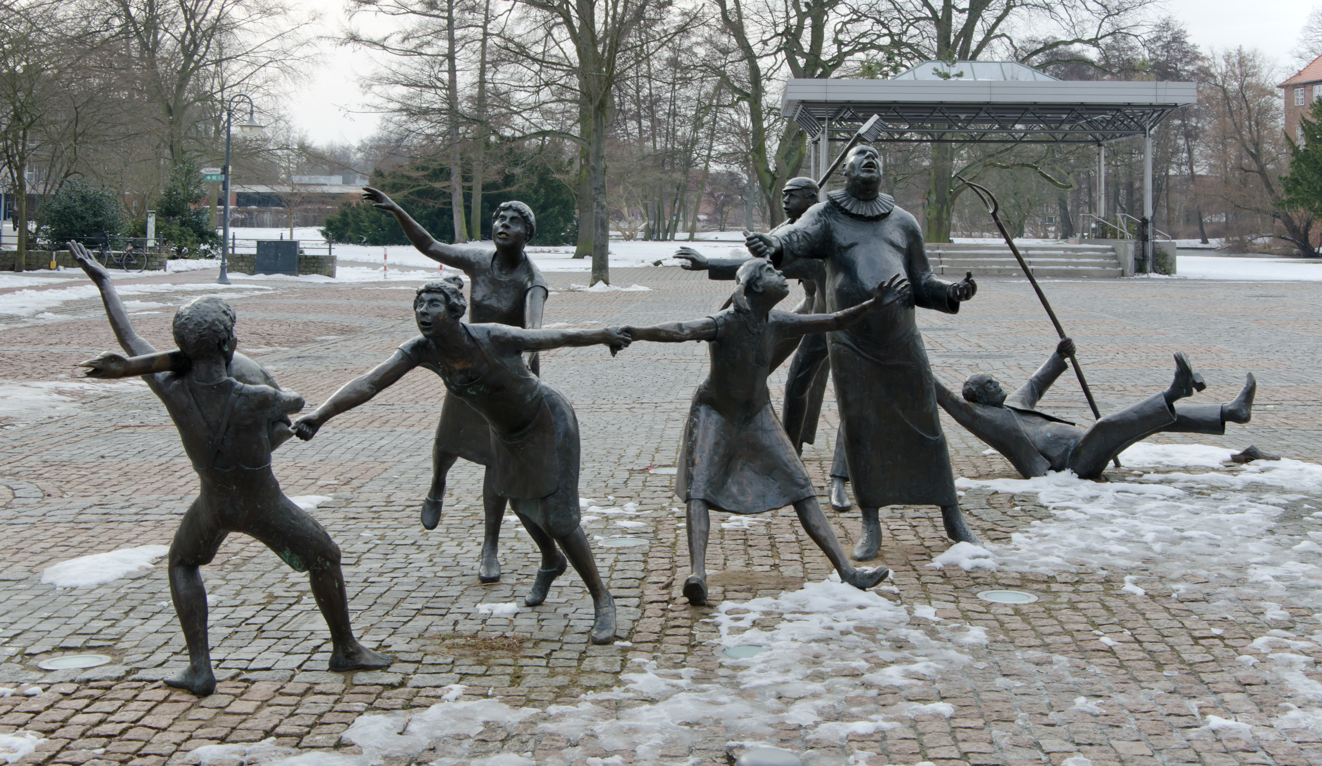 Winsen - Goldene Gans